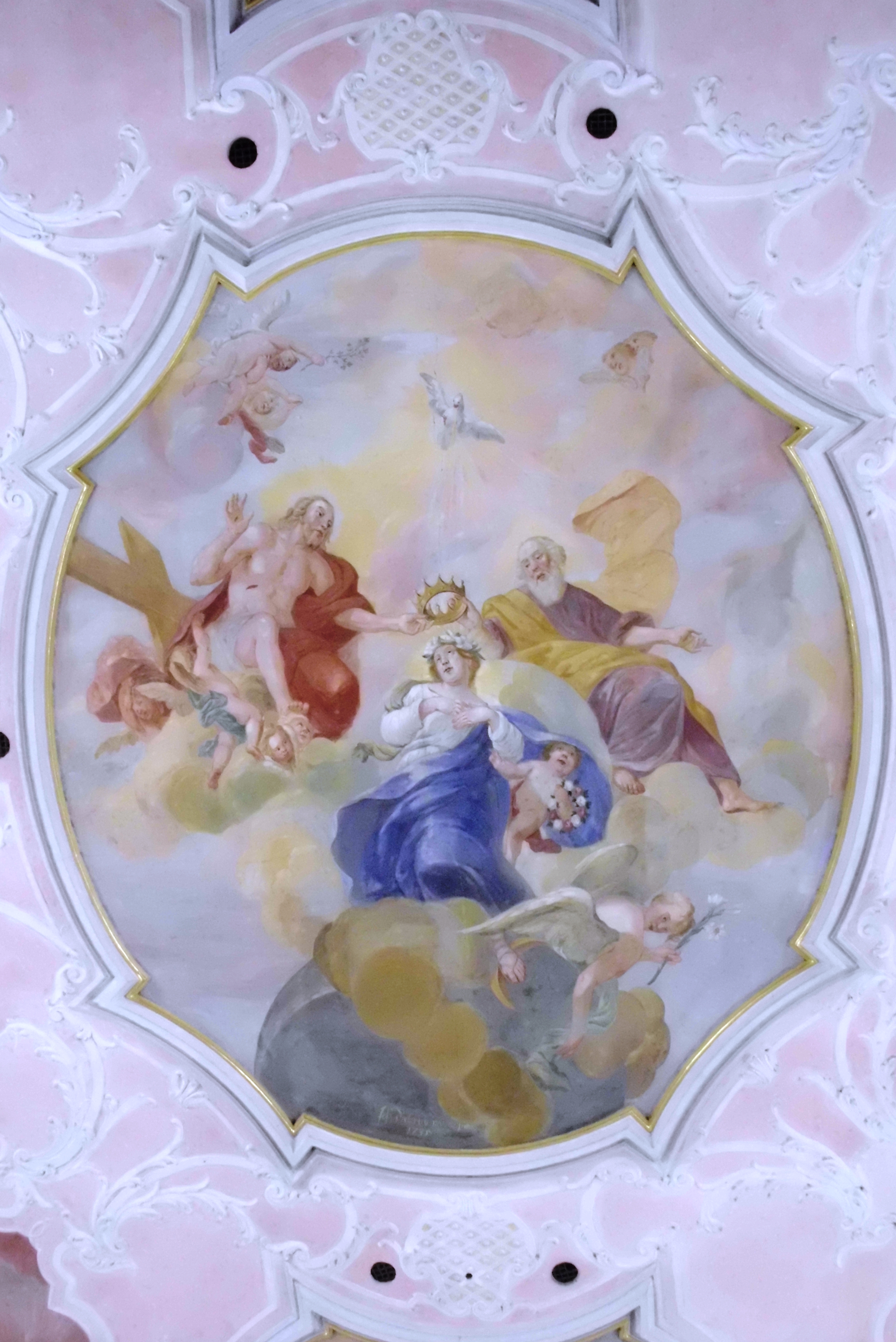 Möckenlohe, kath. Pfarrkirche Mariä Himmelfahrt, Deckengemälde von Joseph Dietrich von 1735 (datiert und signiert)